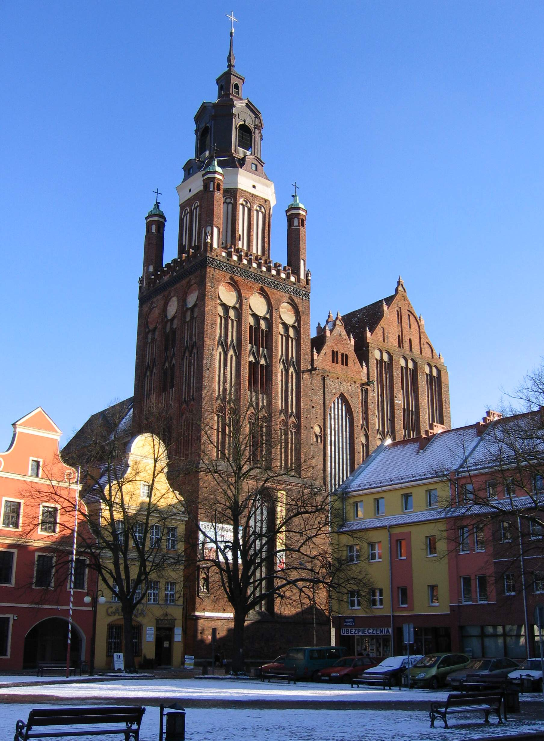 Kolegiata NMP Królowej Świata w Stargardzie